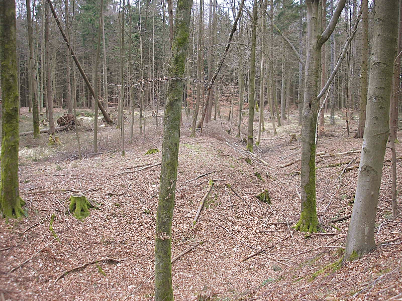 Hochmittelalterlicher Burgstall (Turmhügelburg) Wagesenberg bei Pöttmes (Landkreis Aichach-Friedberg, Bayerisch-Schwaben). Die Vorburg vom Vorwall der benachbarten frühmittelalterlichen Schanze Wagesenberg. Blick nach Westen. Eigene Aufnahme, März 2008 / High Middle Ages Motte-and-bailey castle Wagesenberg near Poettmes (Landkreis Aichach-Friedberg, Bavaria, Germany). The bailey, seen from the eastern earthworks of the neighboring Early Middle Ages hillfort Wagesenberg. View to the west. Own photo, March 2008